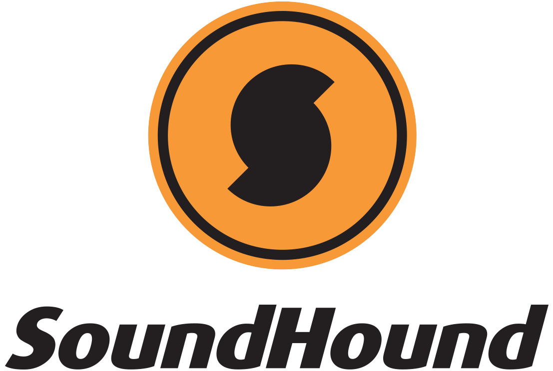 Produktlogo der Musikerkennungssoftware "SoundHound"